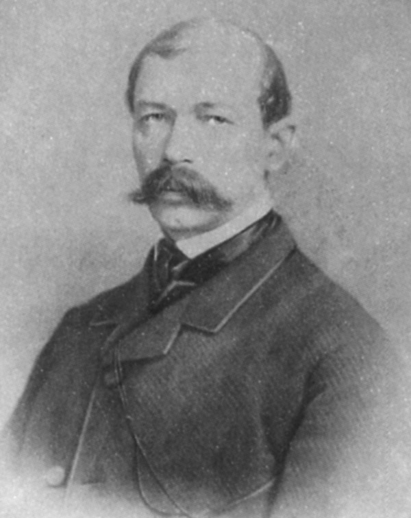 Moritz von Gemmingen (1817-1883)